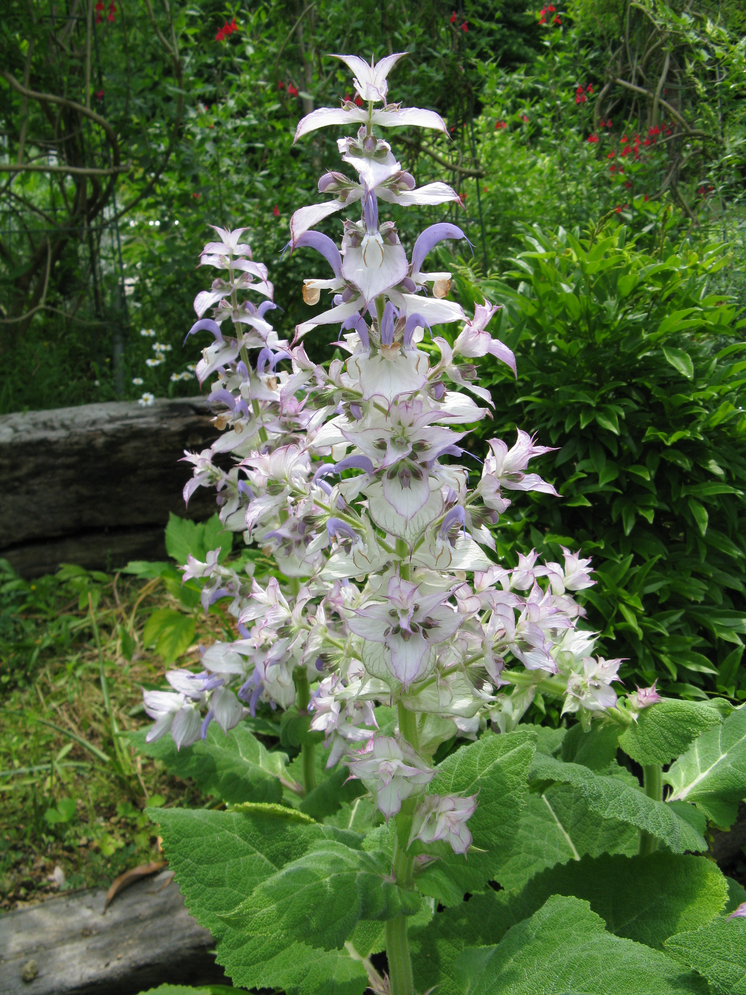 Scientific name Salvia desoleana Place:Osaka,Japan